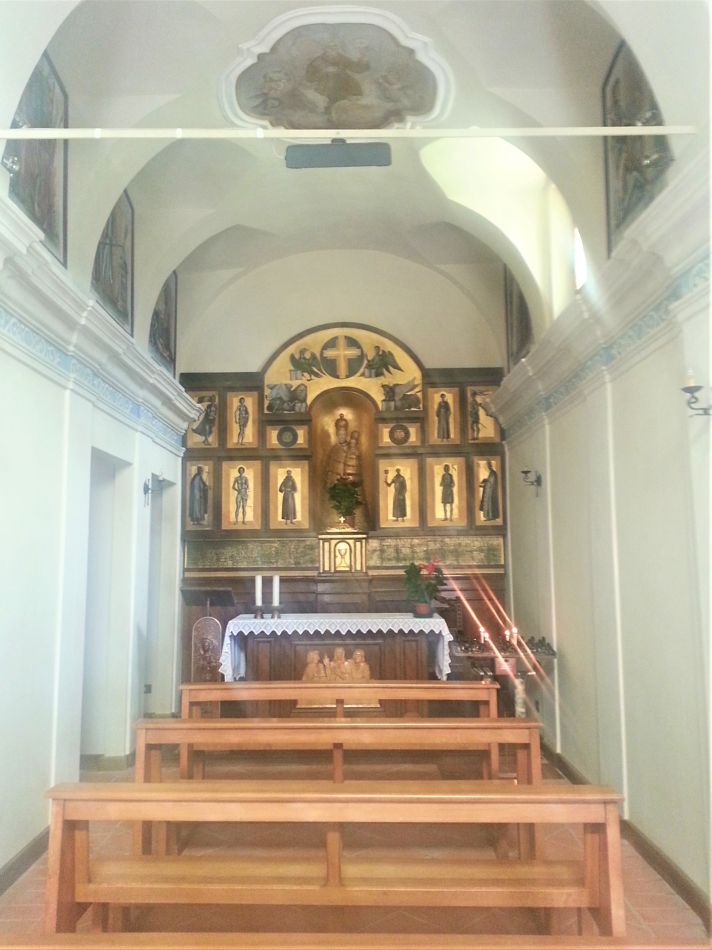 chiesa di san Bernardino a Gromo interno